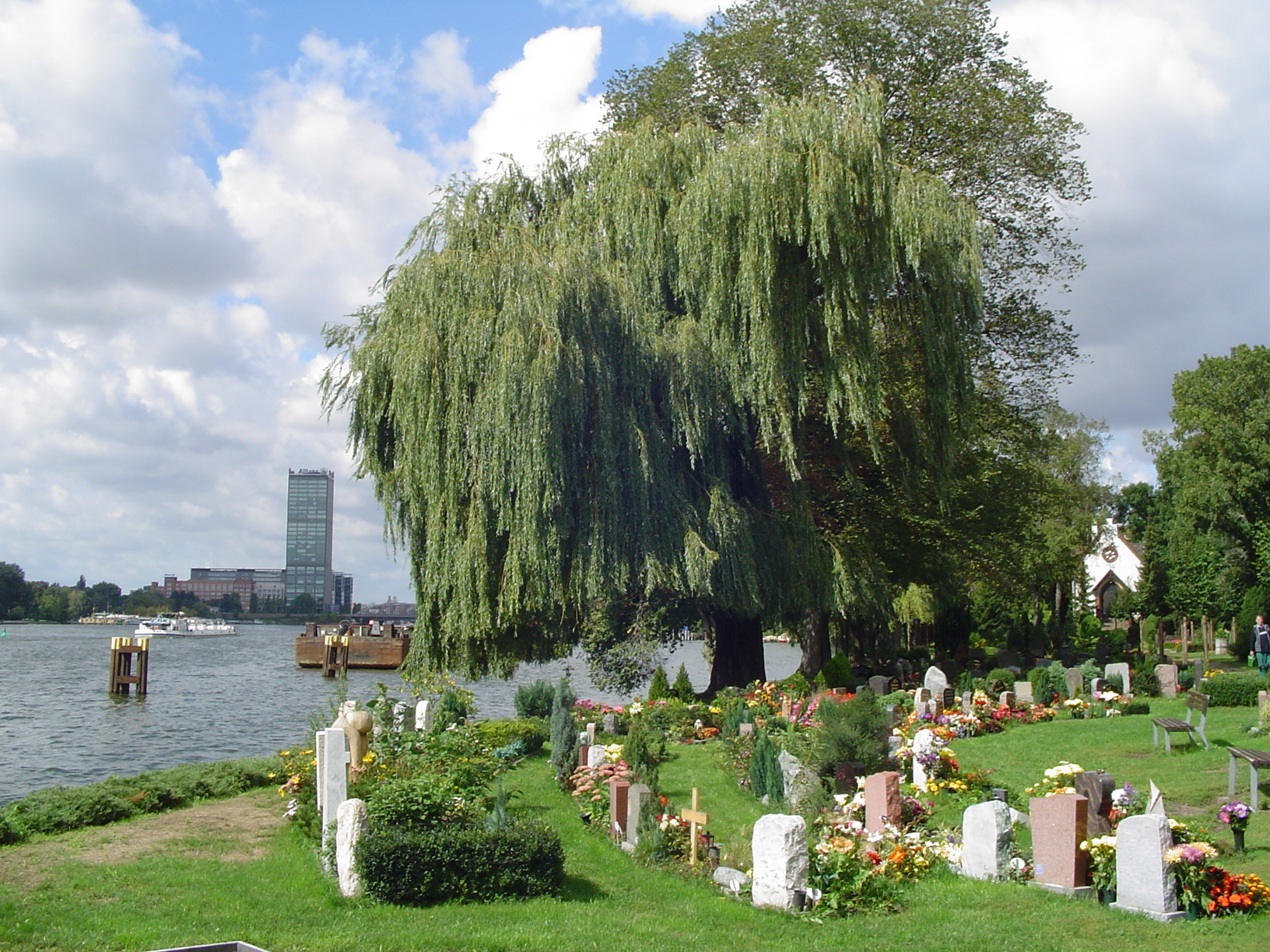 Berlin-Stralau, Dorfkirchhof